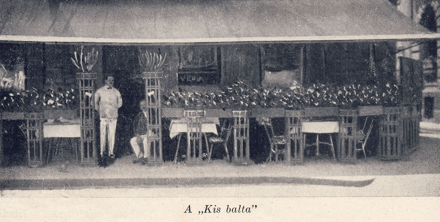 Budapest, Tabán, nevezetes kocsmák - Kis Balta.